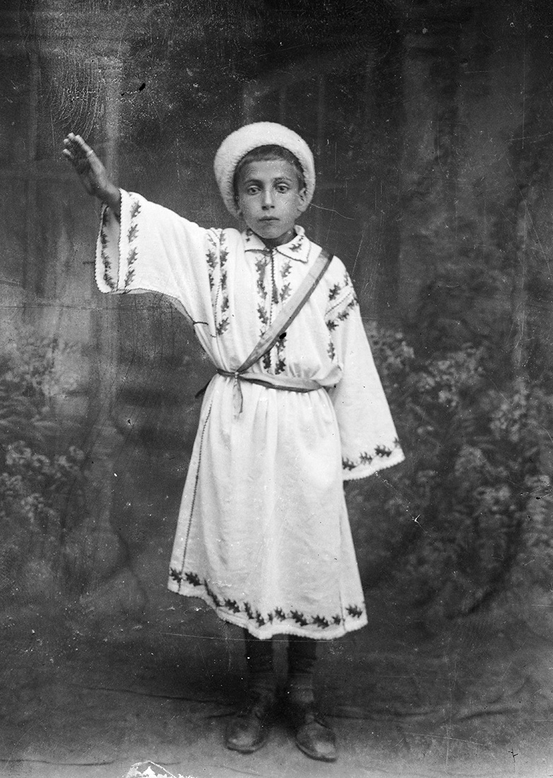 2 imagini: Portrete